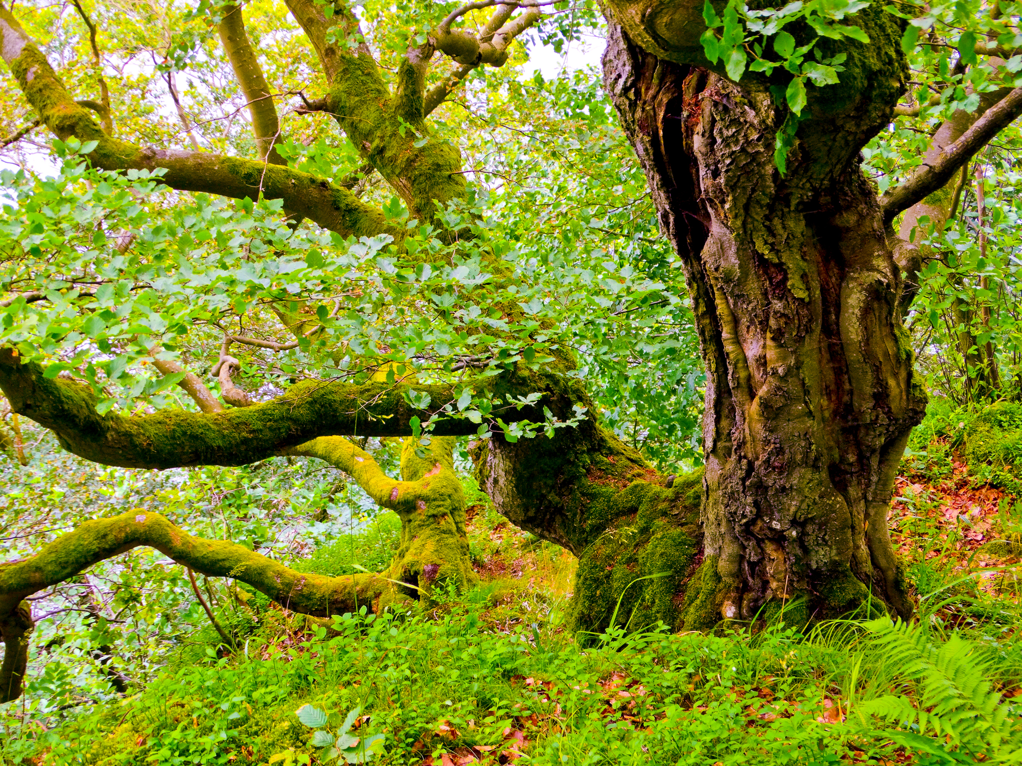 Im Nationalpark Kellerwald am Urwaldsteig Kellerwald-Edersee: Krüppelbuchen an den Hängen des Edersees.